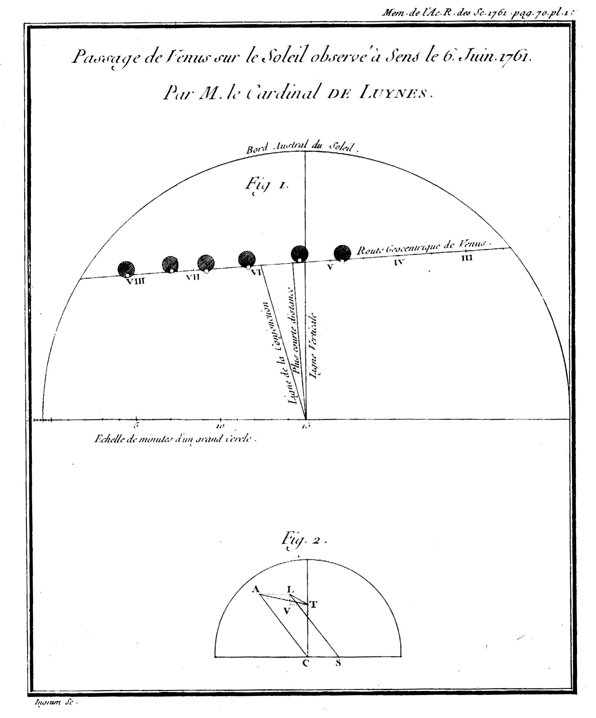 Relevés du passage de Vénus devant le disque du Soleil.